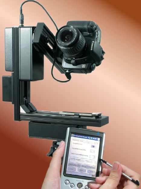 "Rodeon VR Head" zur automatischen Aufnahme von Panoramen mit herkömmlicher digitalen / analogen Kameratechnik